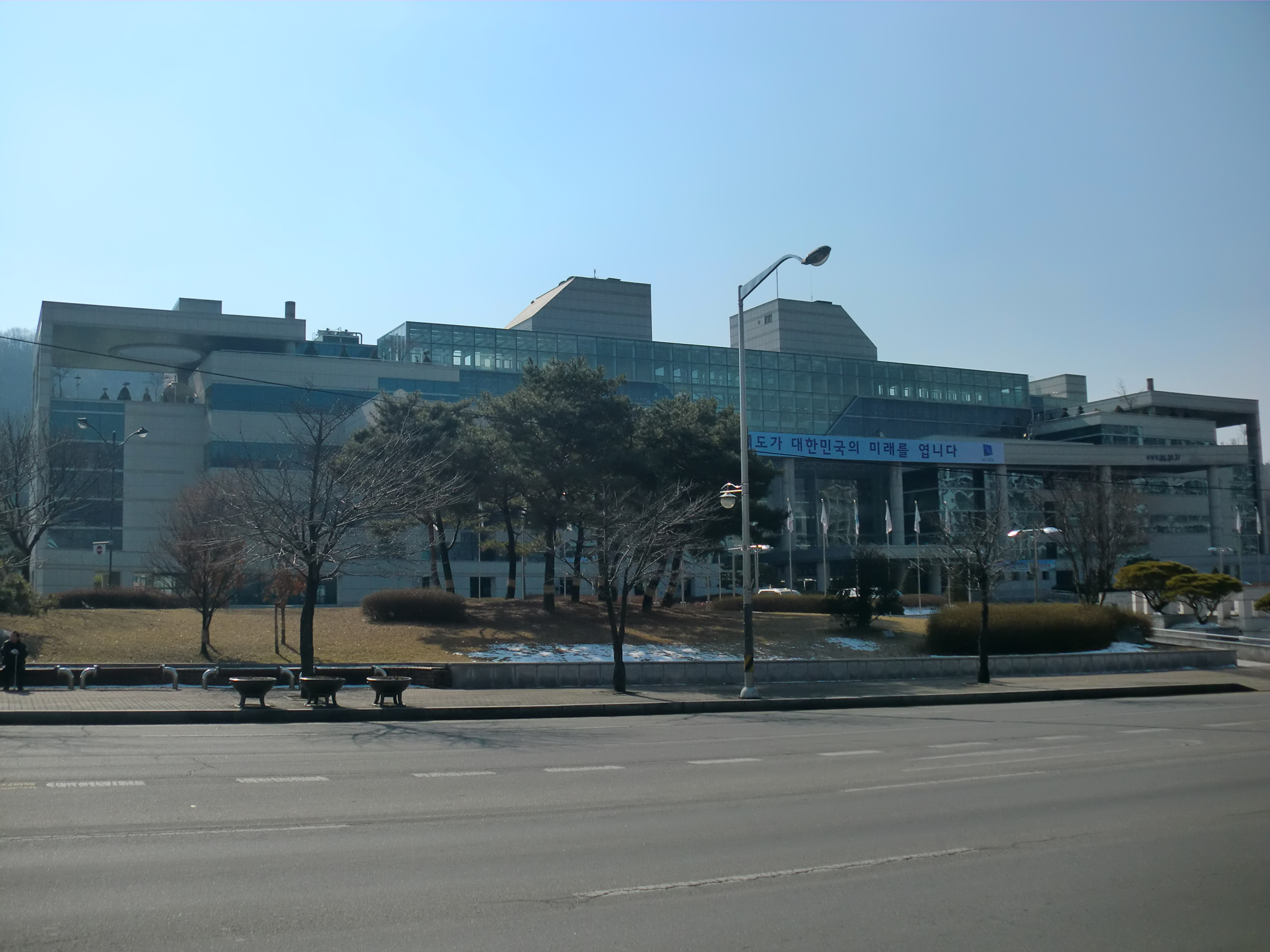 경기도 의정부시에 있는 경기도 북부청사